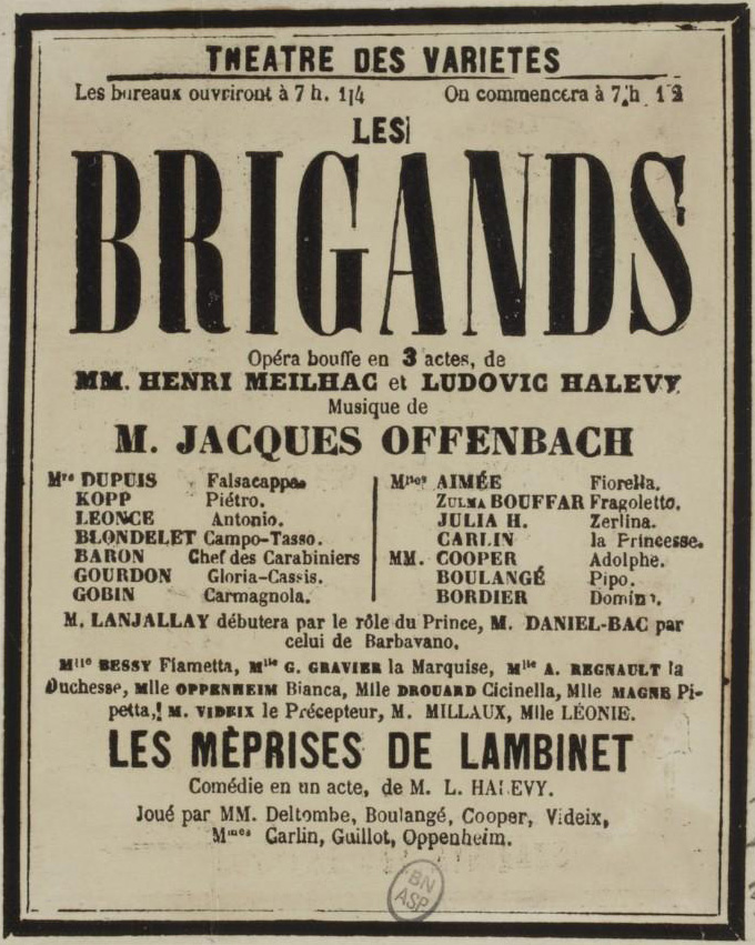 Affiche de la création de l'opéra-bouffe de Jacques Offenbach, livret de Henri Meilhac et Ludovic Halévy, le 10 décembre 1869.